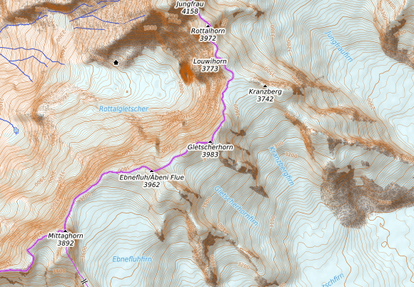 carte réalisée sur umap This map may be incomplete, and may contain errors. Don't rely solely on it for navigation.